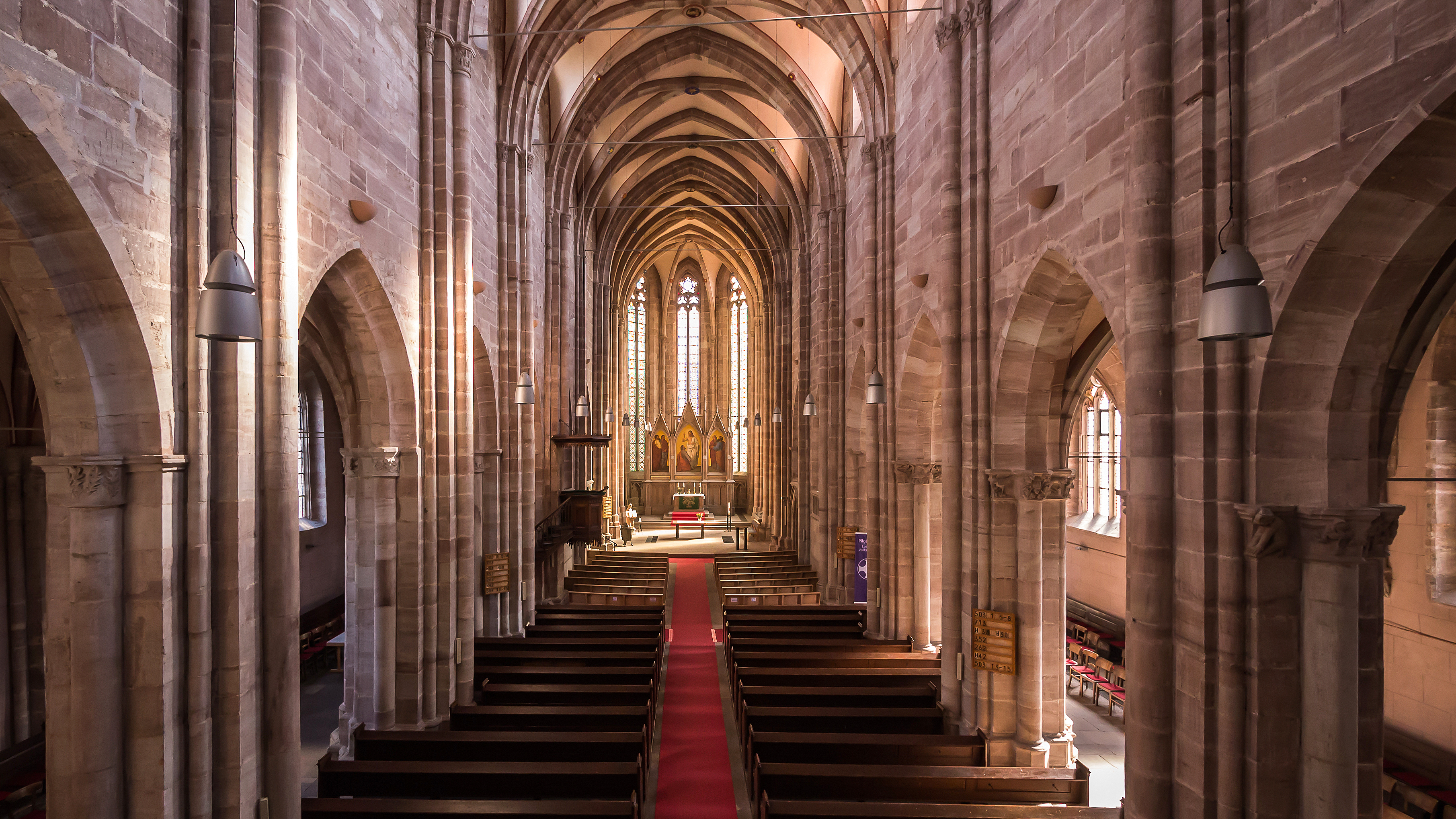 Heilbad Heiligenstadt Friedensplatz 1 St. Martin Pfarrkirche (evangelisch) Mittelschiff 6